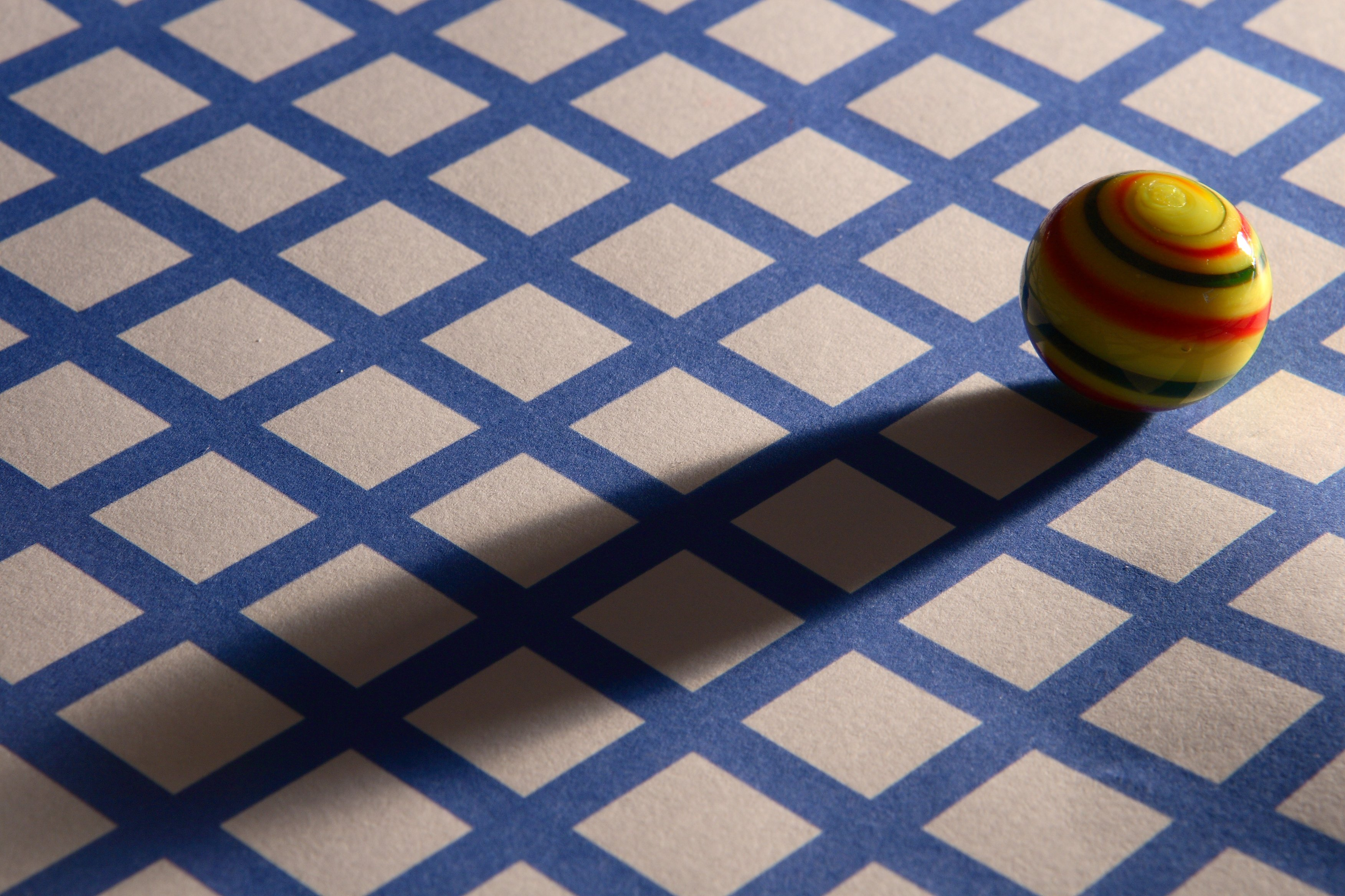 Glasmurmel mit Schatten auf kariertem Grund